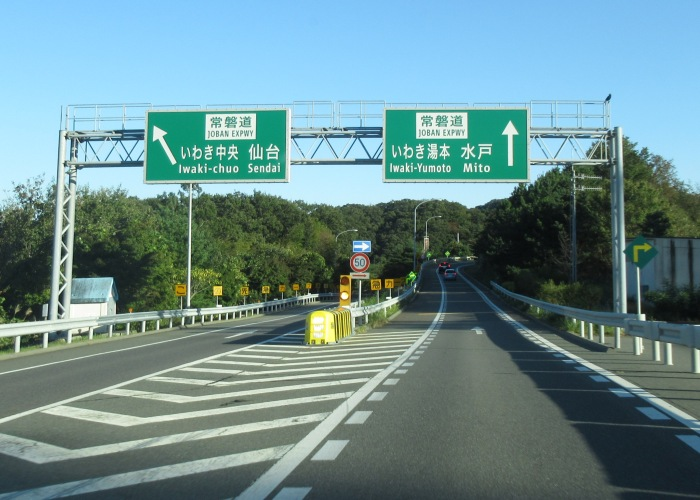 いわきジャンクション